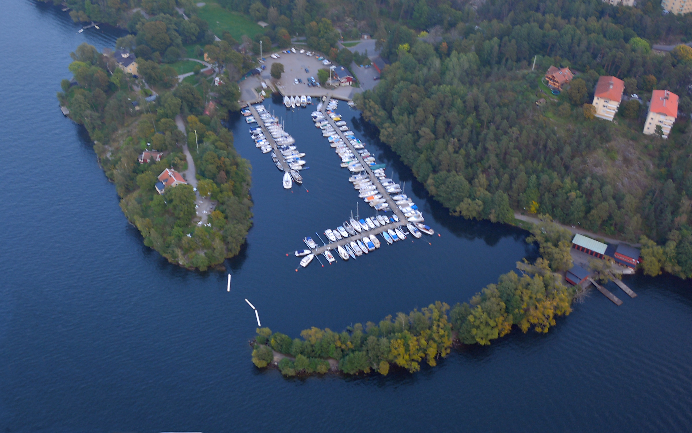 Klubbensborg i Mälarhöjden, södra Stockholm.